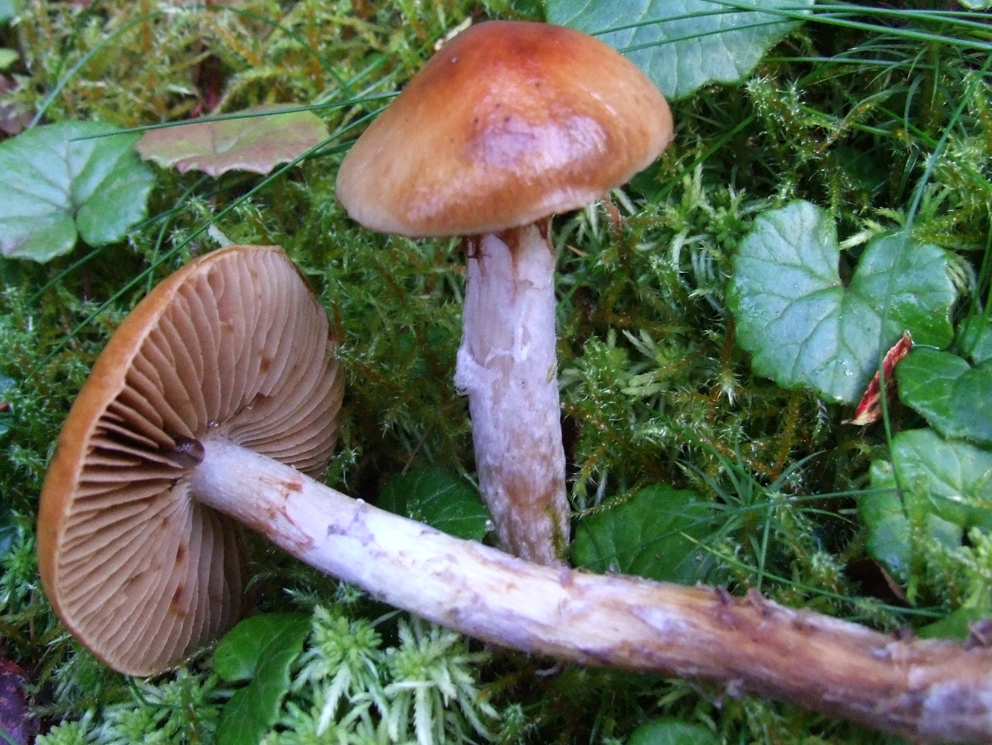 Cortinarius collinitus (habitat:West Tatra Mountains,Dolina Chochołowska)